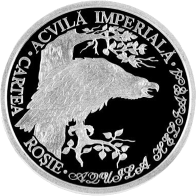 Реверс памятной монеты "Орёл-могильник"